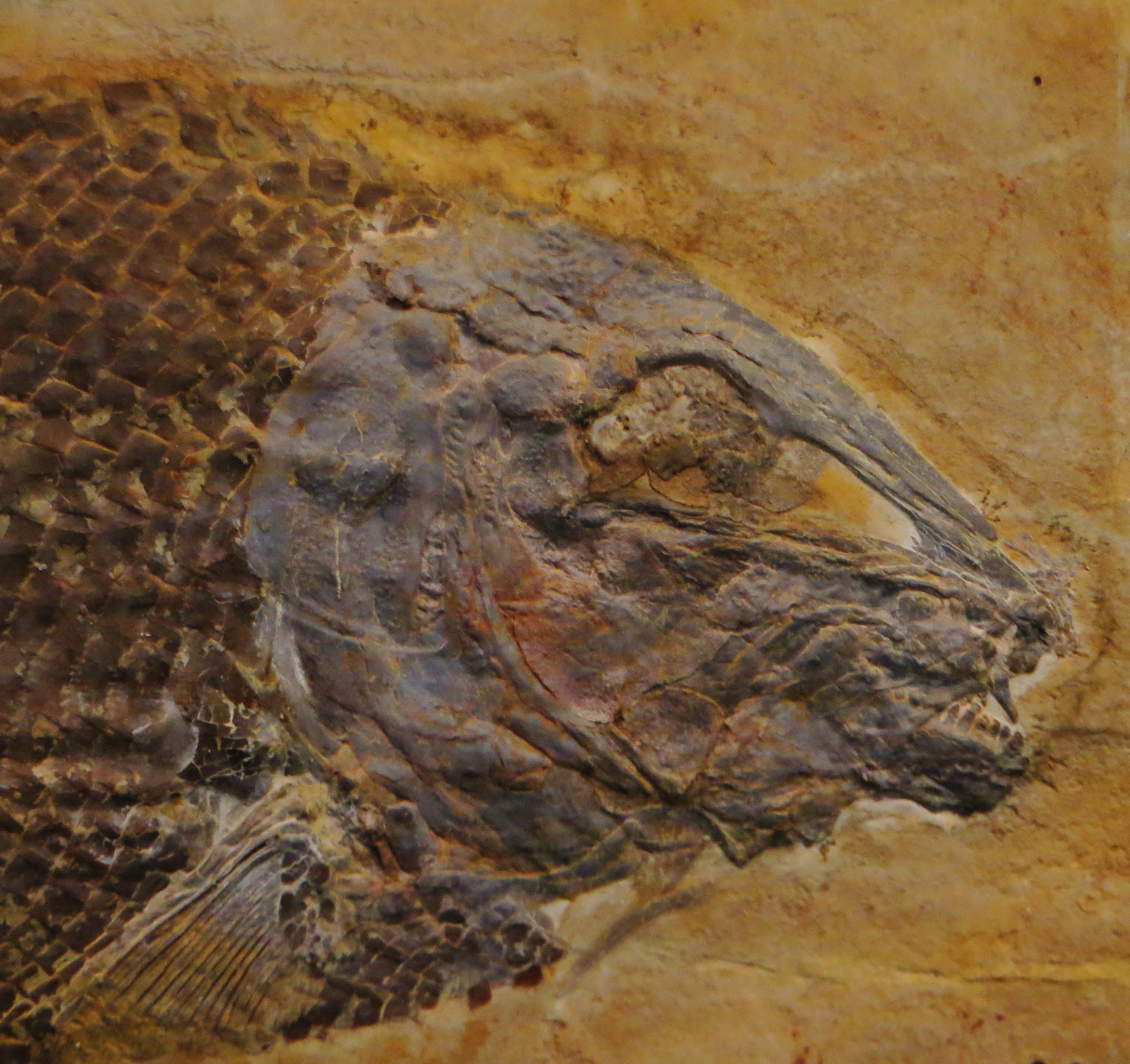 Fossil of Occitanichthys - extinct fish